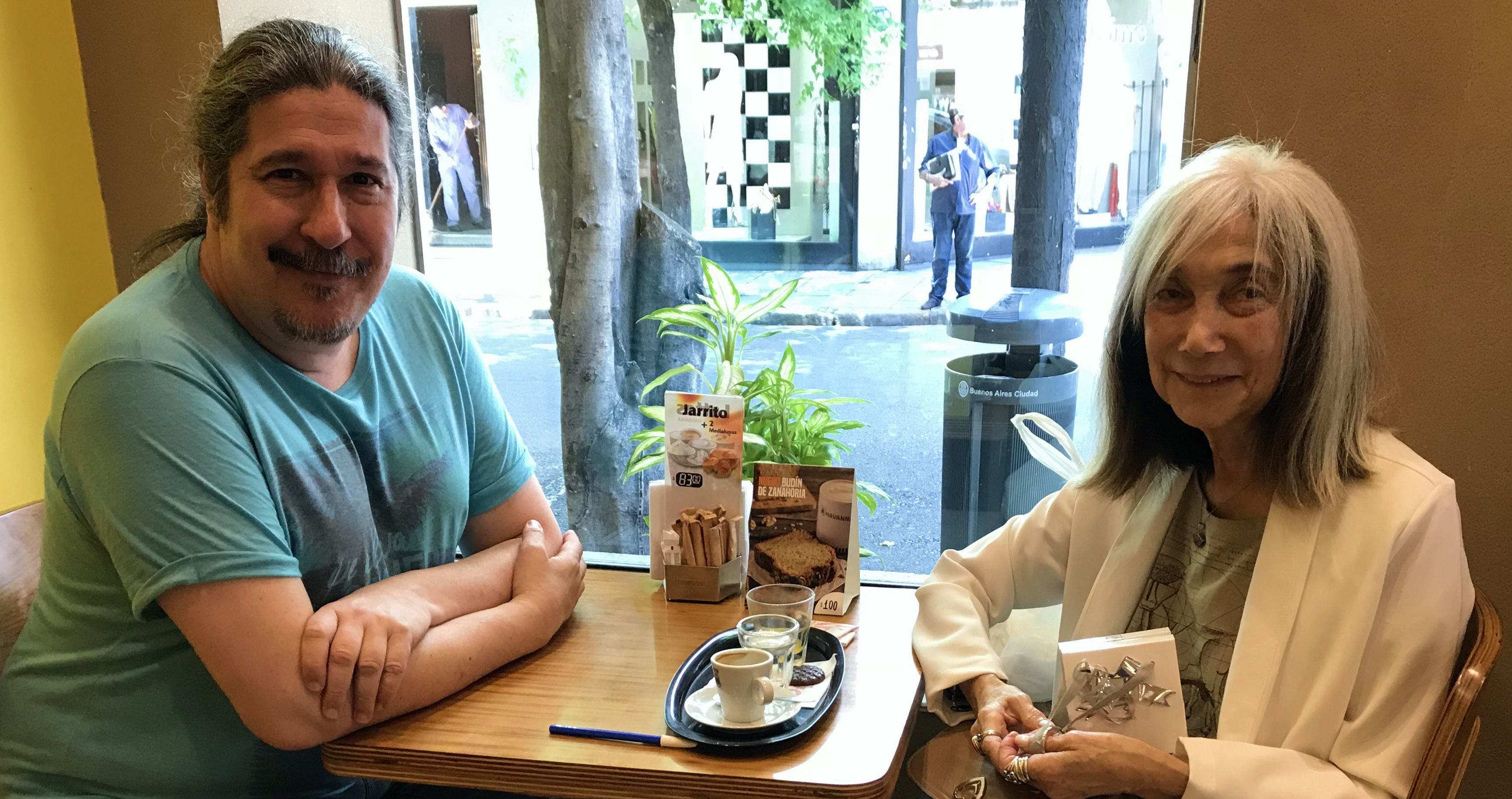 El escritor Alejandro Pose Mayayo y María Kodama, 2017.